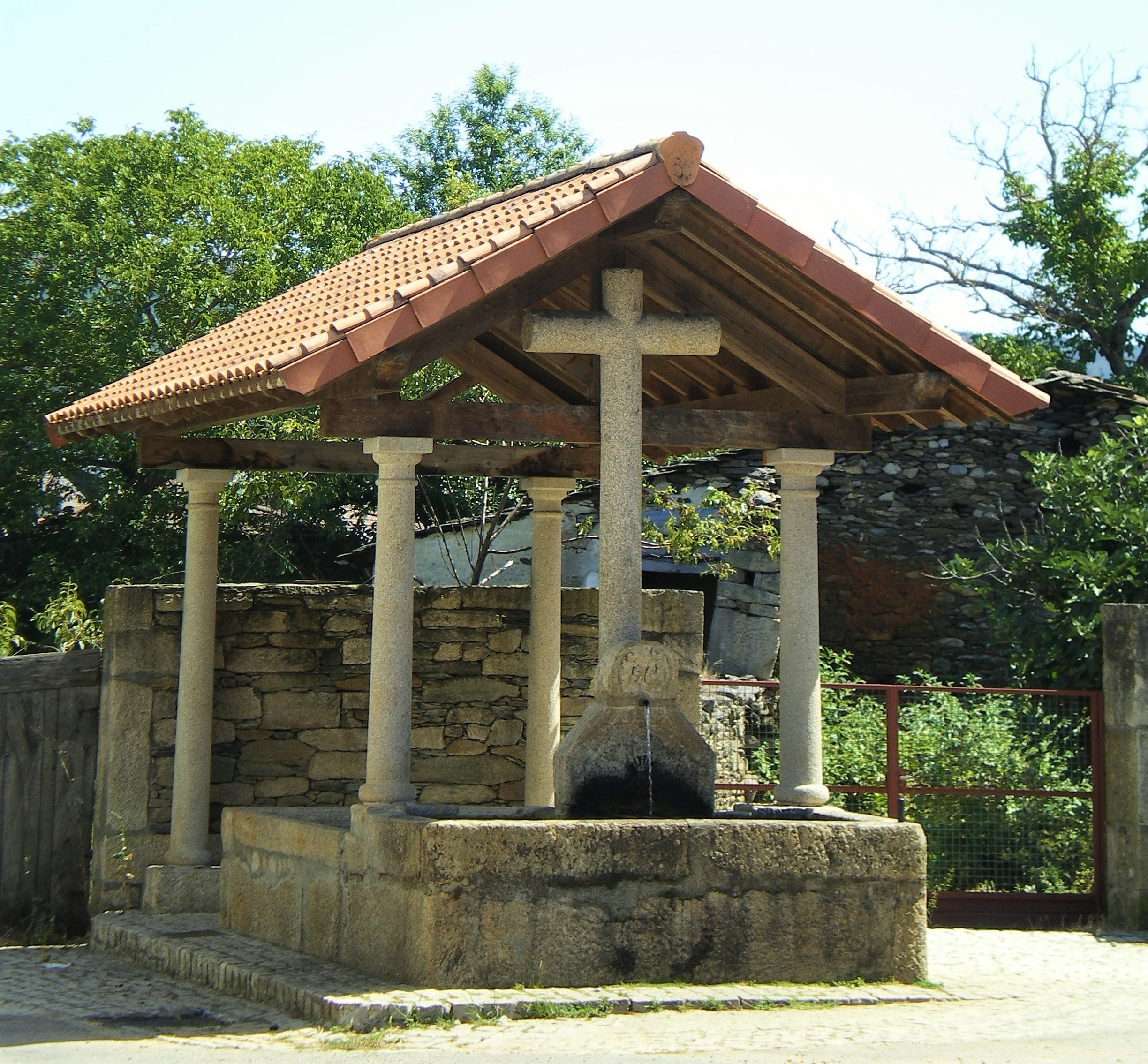 Soutelo Verde - Fonte e Cruceiro